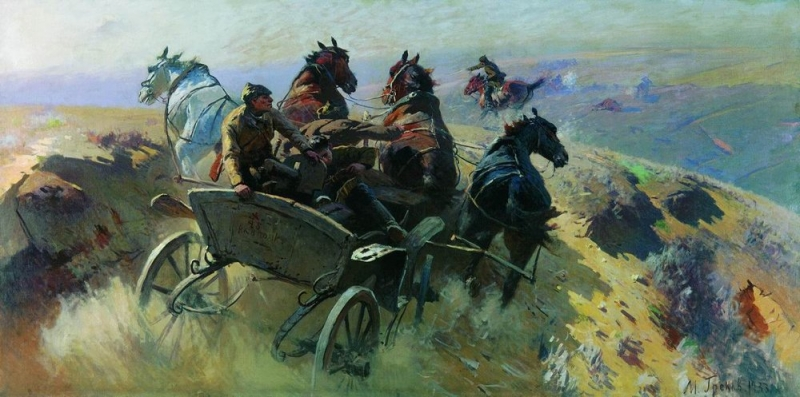 Тачанка (Выезд на позиции). 1933 Холст, масло. 150 x 300 см Государственная Третьяковская галерея